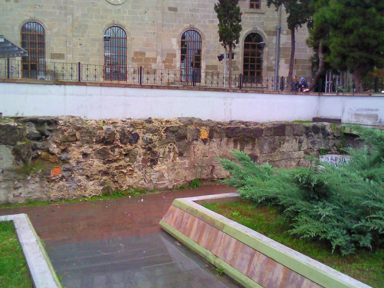 Samsun Kalesi'nin 2009 yılında bulunan surları.